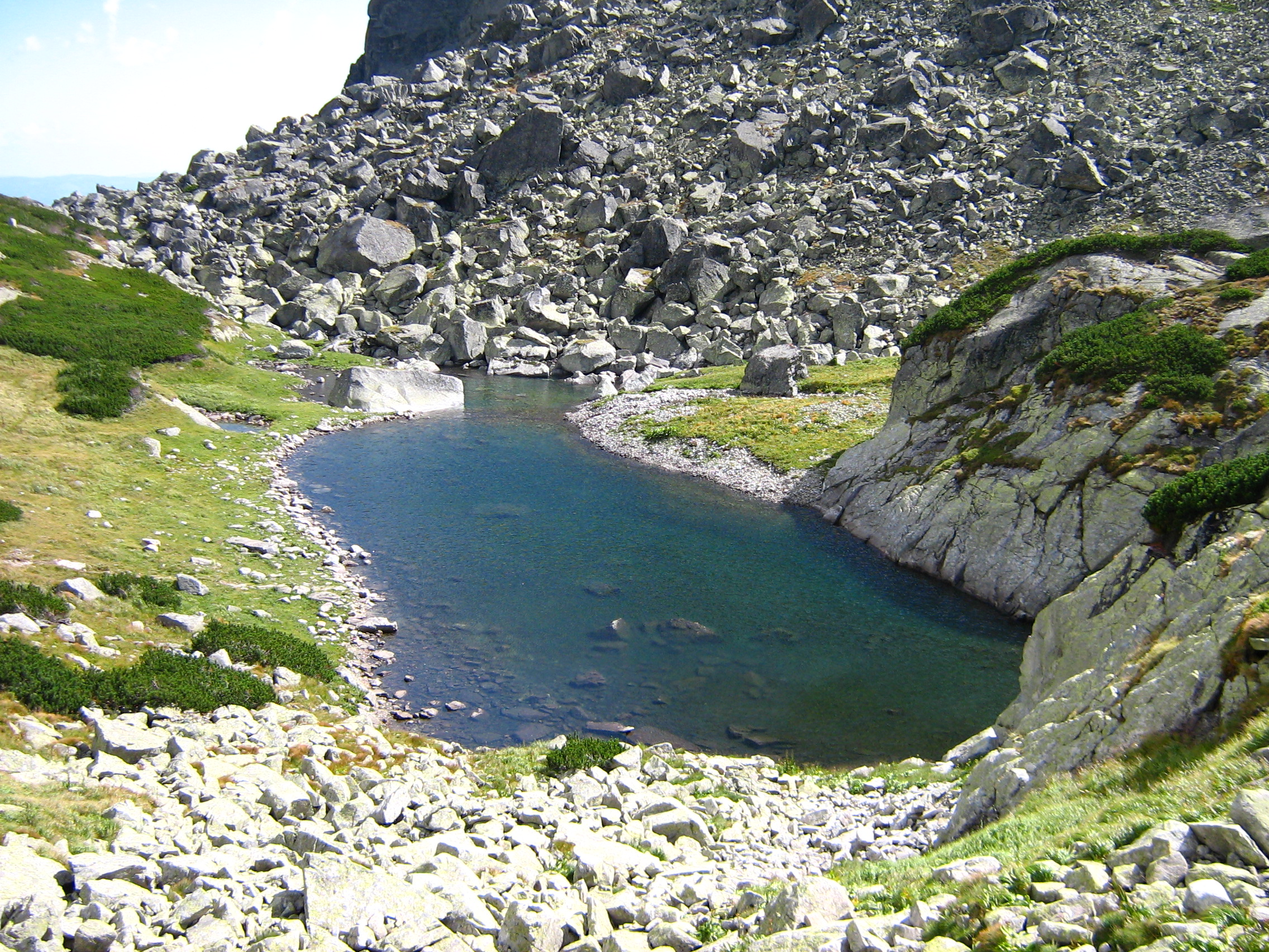 Warzęchowy Staw, Vareškové pleso